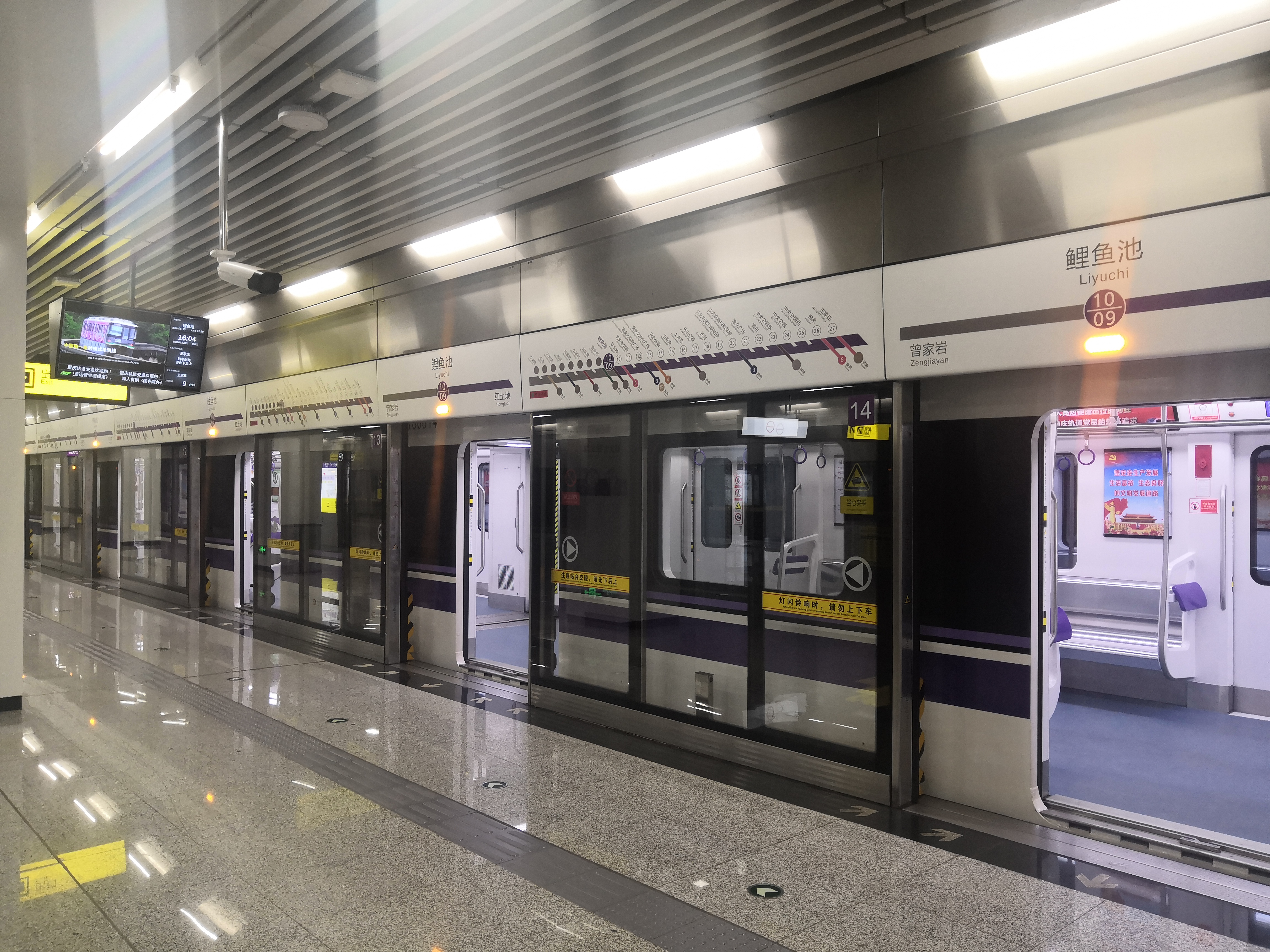 crt